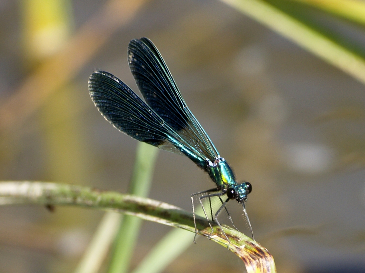 Calopteryx xanthostoma